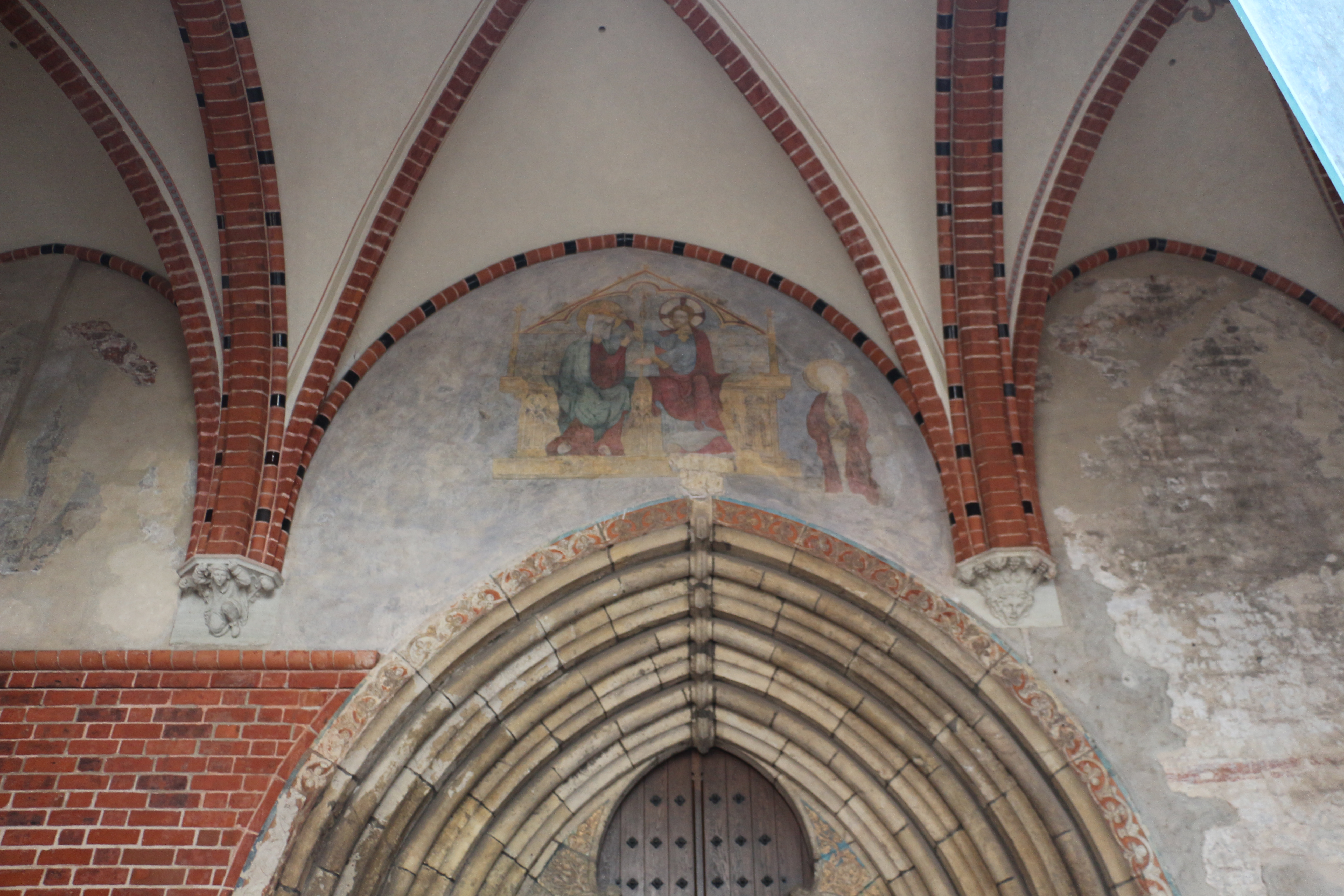 Eingangsbereich des Soms zu Riga